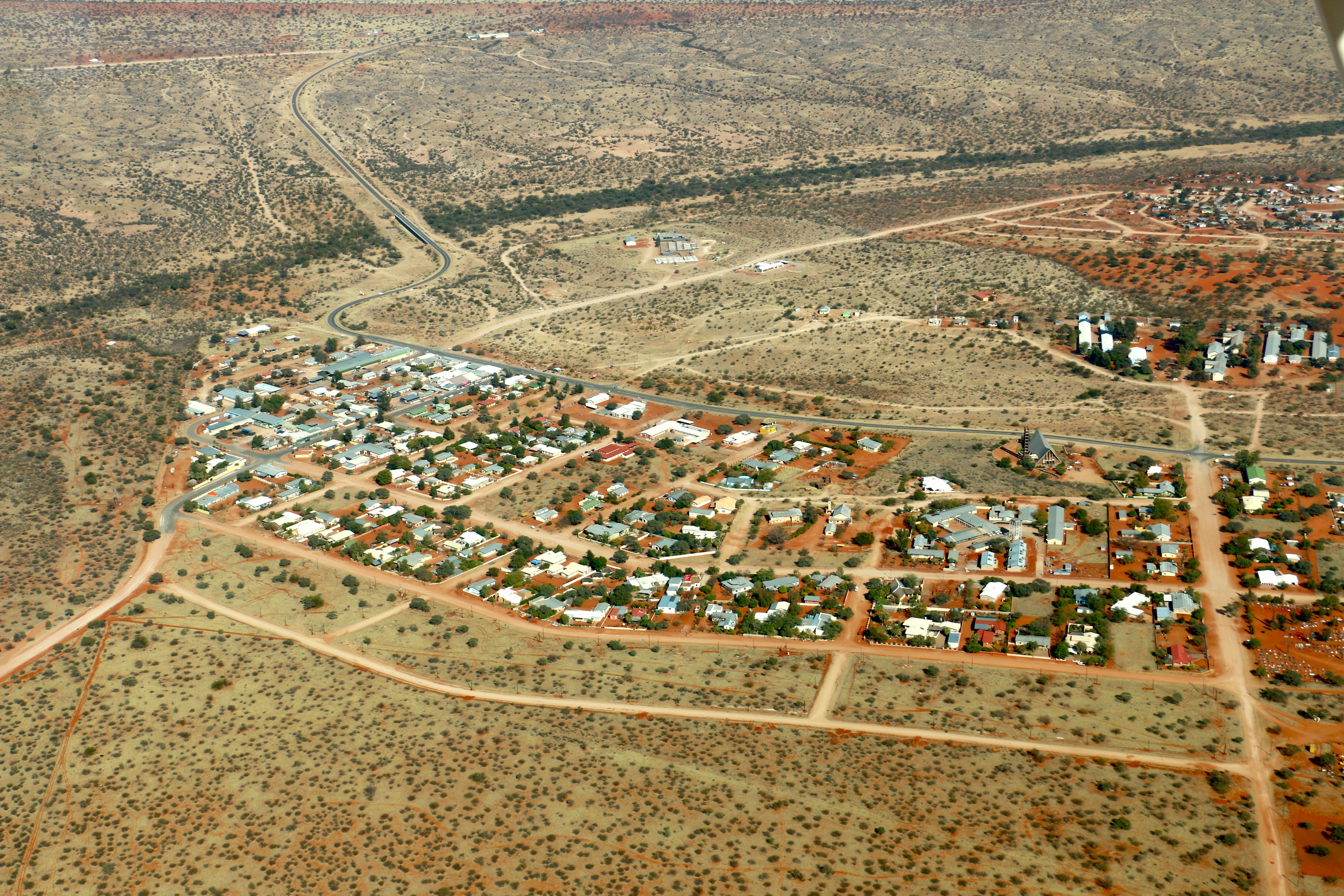 Aranos aus der Vogelperspektive (2017)